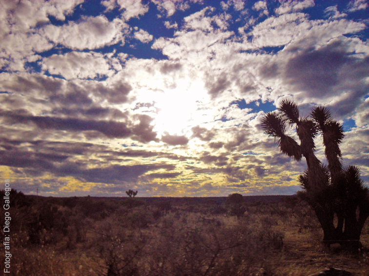 paisaje semidesertico, matorrales y cactaceas.